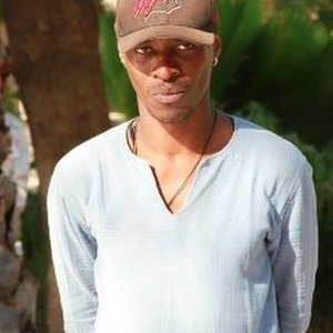 Cyril SEBAS réalisateur français d'origine sénégalaise